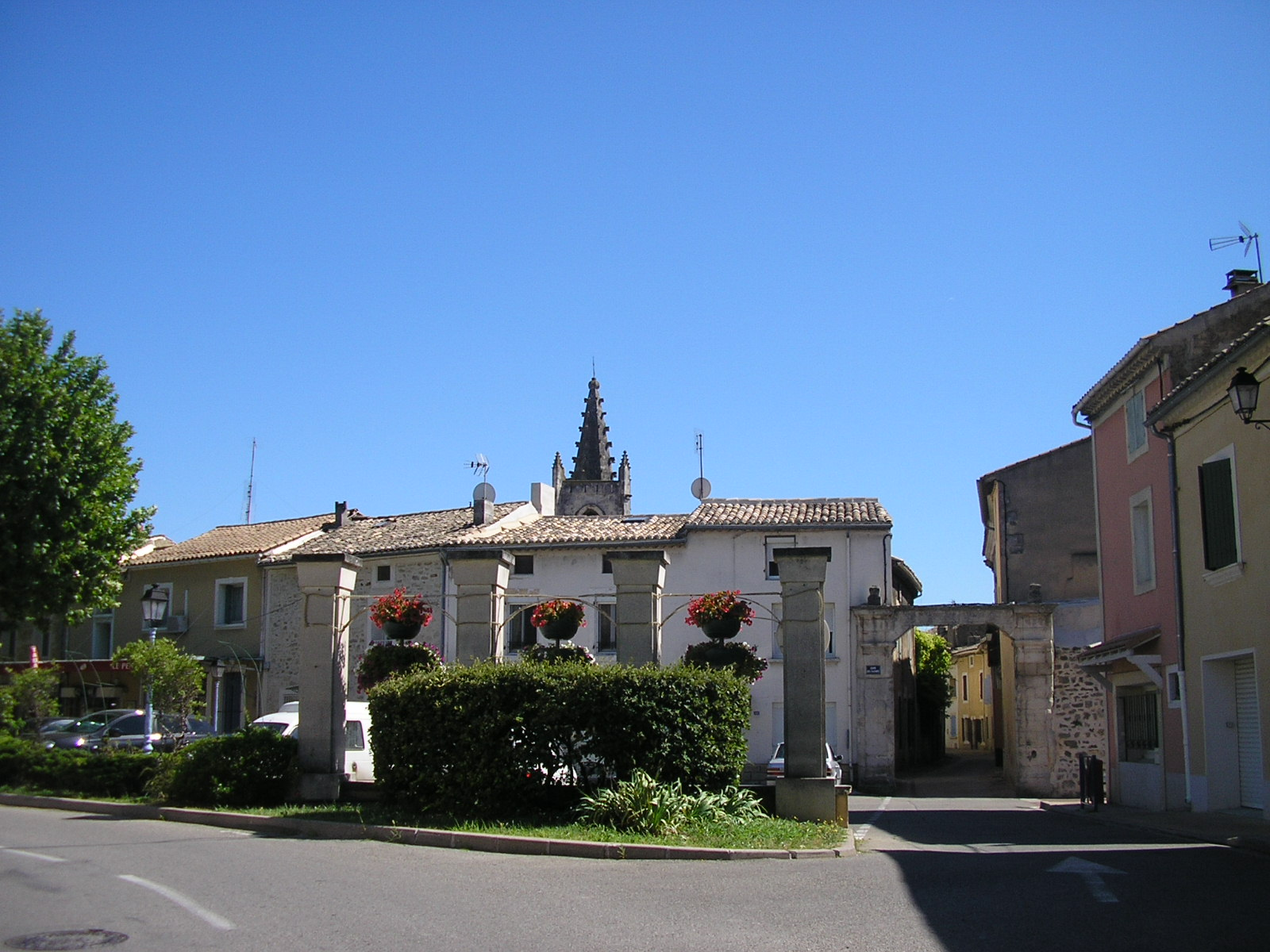 Lapalud, entrée du village